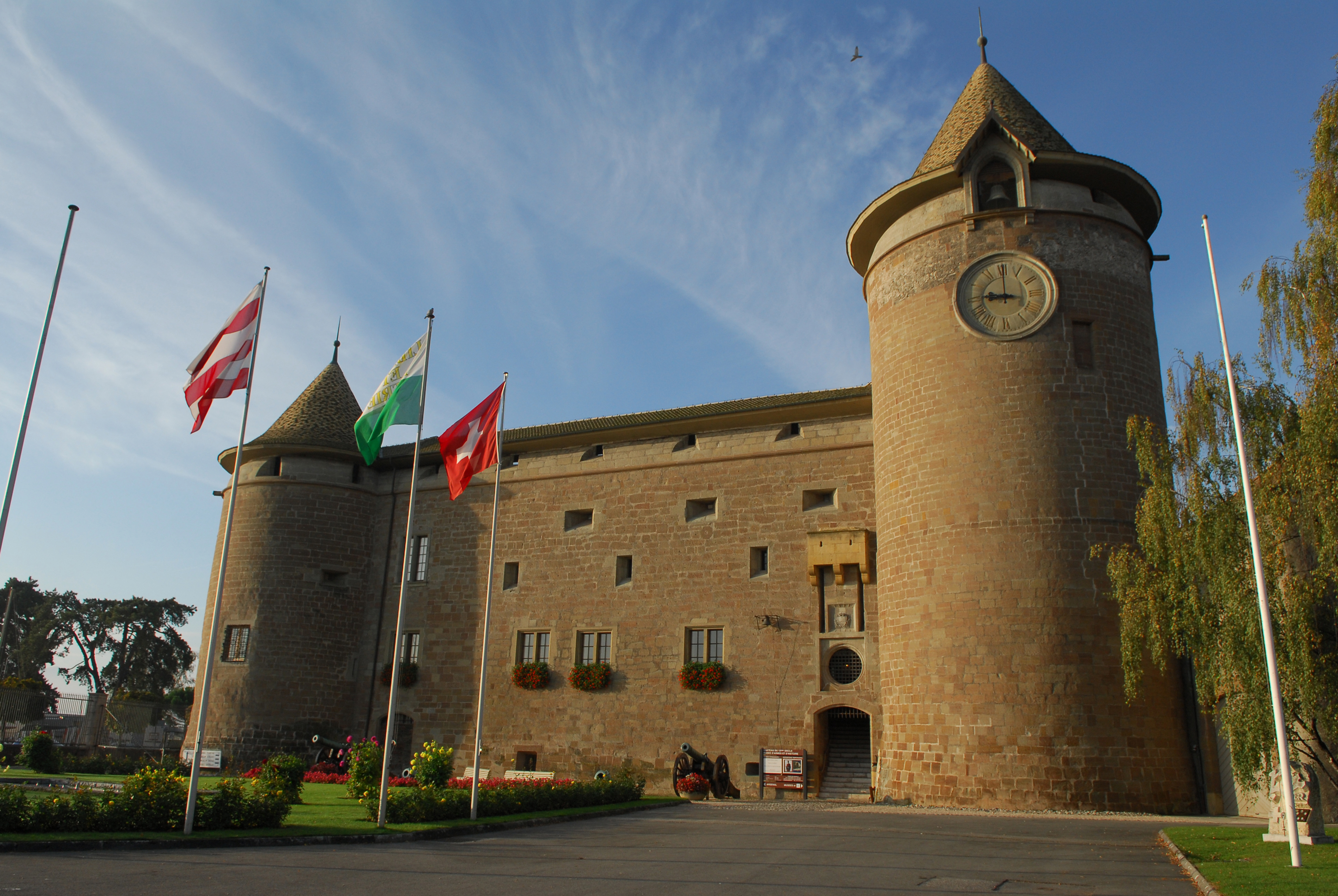 Château vu de face à l'entrée